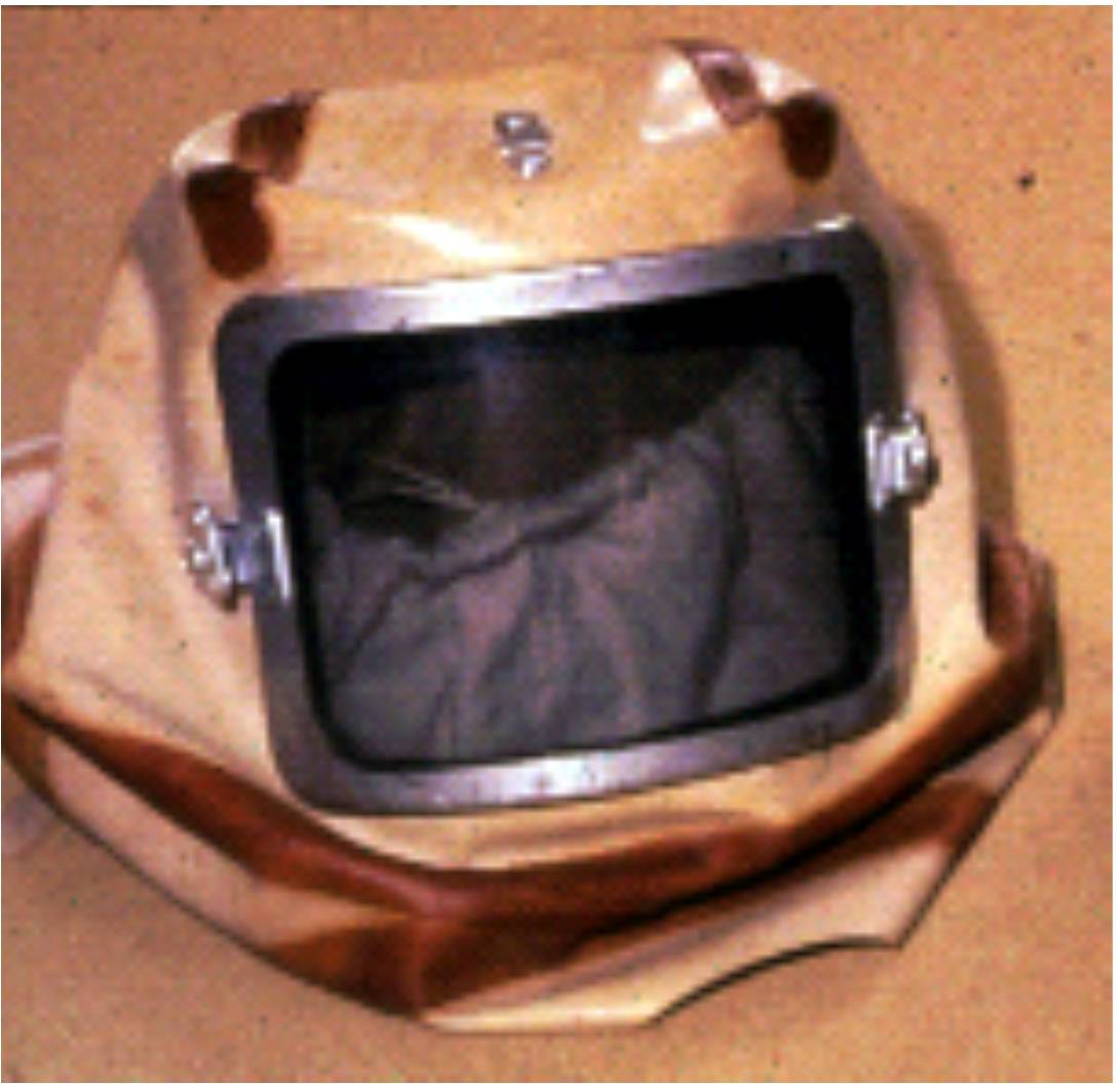 Капюшон респиратора с принудительной подачей воздуха